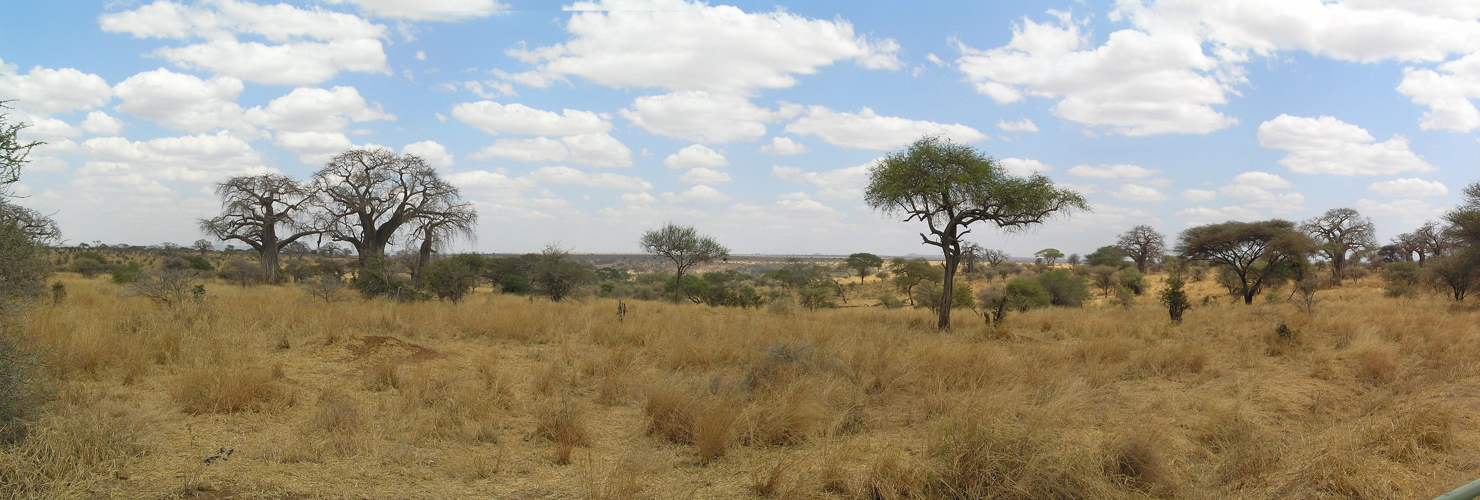 Merge di alcune foto che ho scattato nel settembre 2004 durante un safari fotografico.